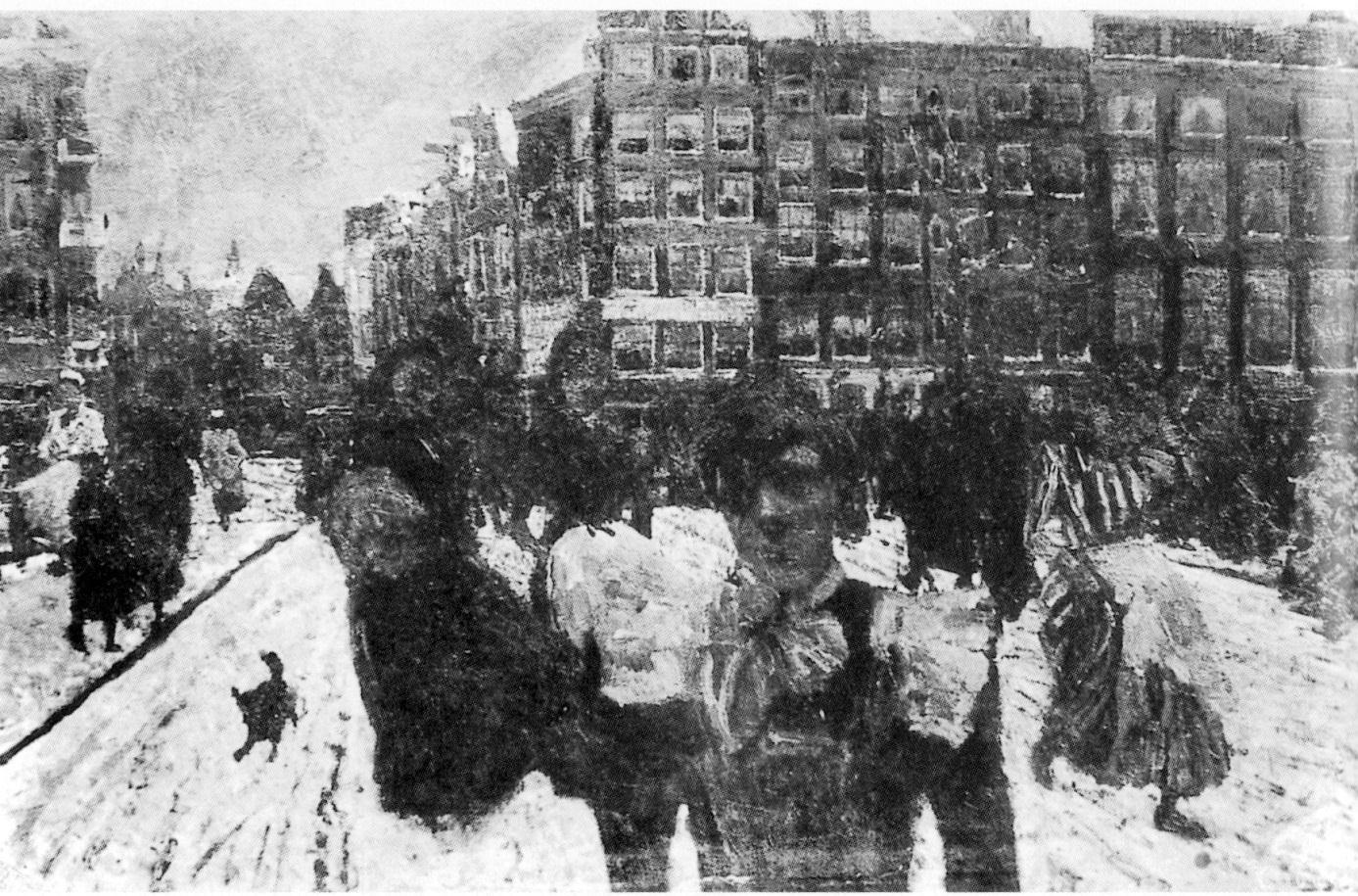 George Hendrik Breitner, De Singelbrug bij de Paleisstraat te Amsterdam (oorspronkelijke toestand), ca. 1896, olieverf op doek, 100 x 152 cm, Rijksmuseum, Amsterdam